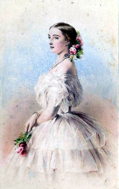 Grand Duchess of Russia, Olga Feodorovna, Prinzessin Cäcilie Auguste von Baden (1839-1891)